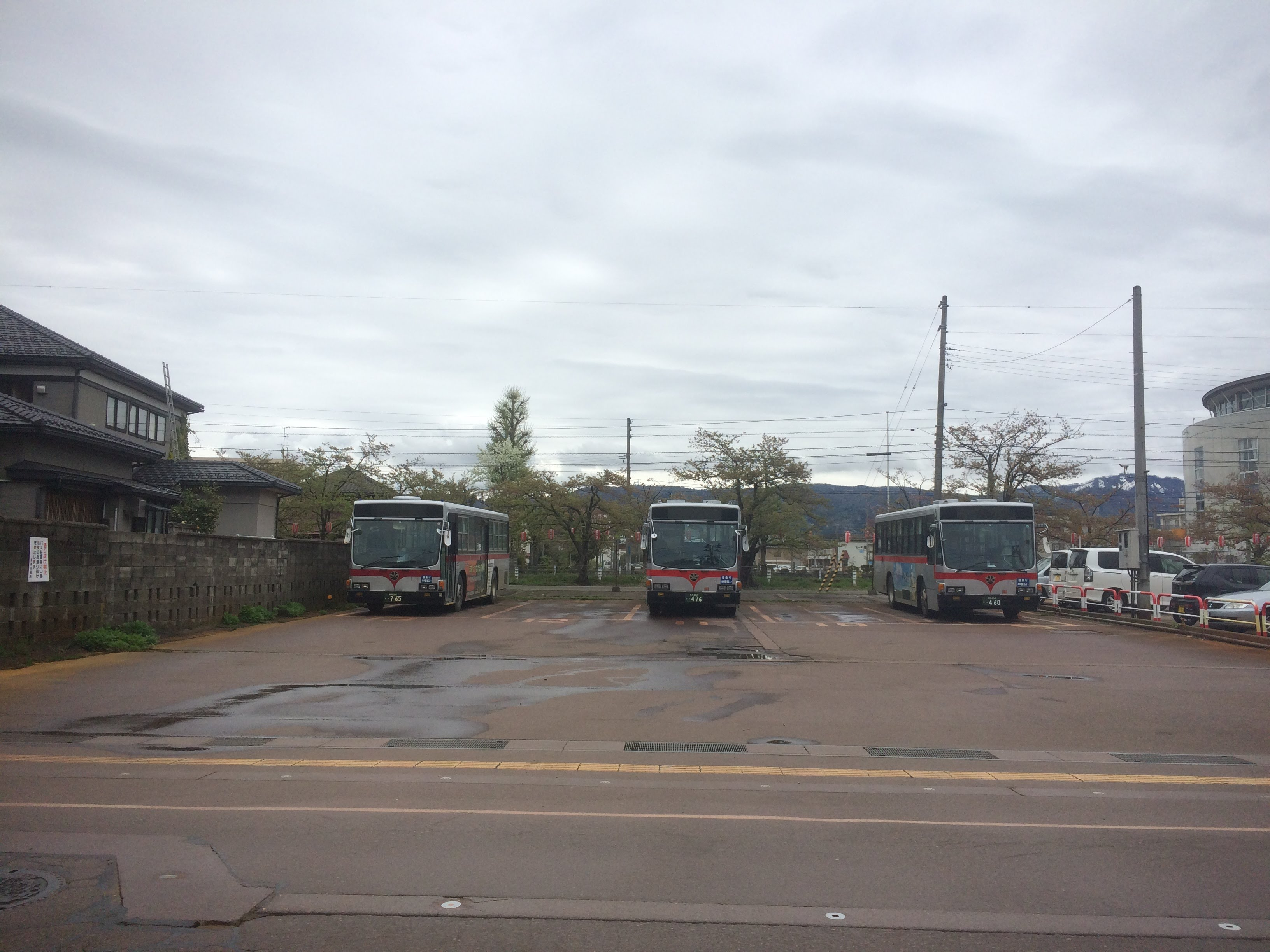 越後交通・長岡駅東口車庫